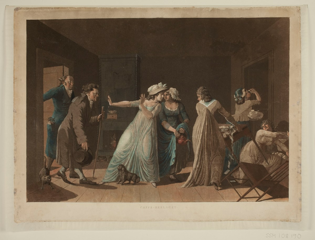 Kaffebeslaget, Martin (Mårten) Rudolf Heland - efter Per Nordquists målning med samma namn, 1799. Akvitint på pappersunderlag. Mått i mm: 363x524. Lagens hantlangare överraskar ett kaffedrickande sällskap damer, som skyndar sig att försöka dölja sin kaffedrickning. Konstnär: Heland, Martin (Mårten) Rudolf (1765-1814) från 1799 - efter målningen "Kaffebeslaget" av Per Nordquist (1771-1805). Objekt-ID: Inventarienummer SSM 108190.